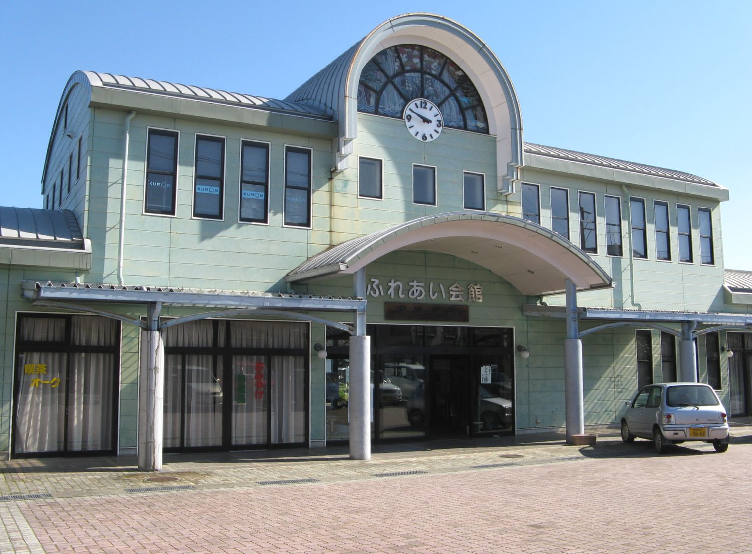 豊肥本線 豊後荻駅 2008年10月 Bakkai撮影